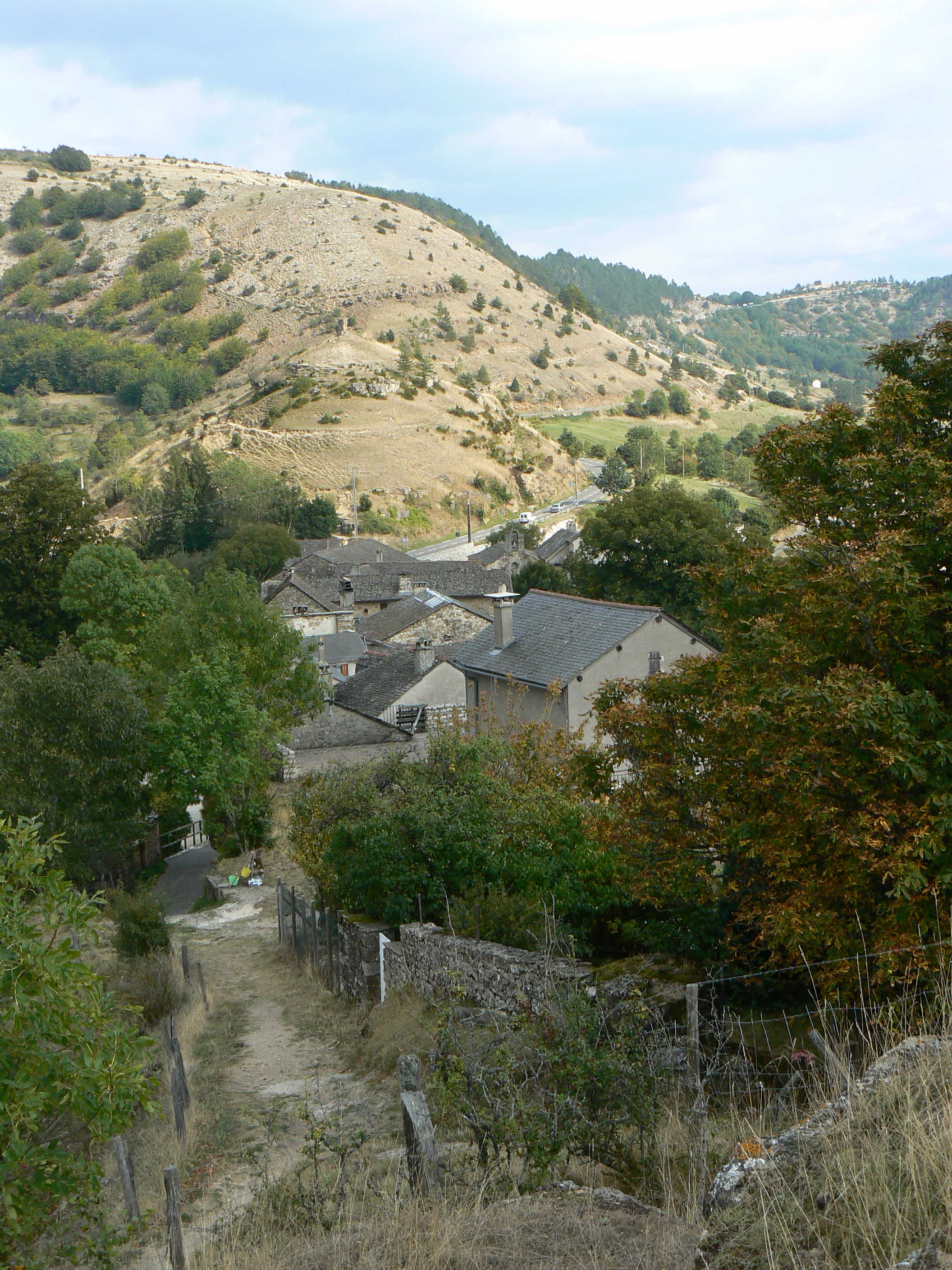 Vue générale de la commune de Saint-Laurent-de-Trèves en Lozère